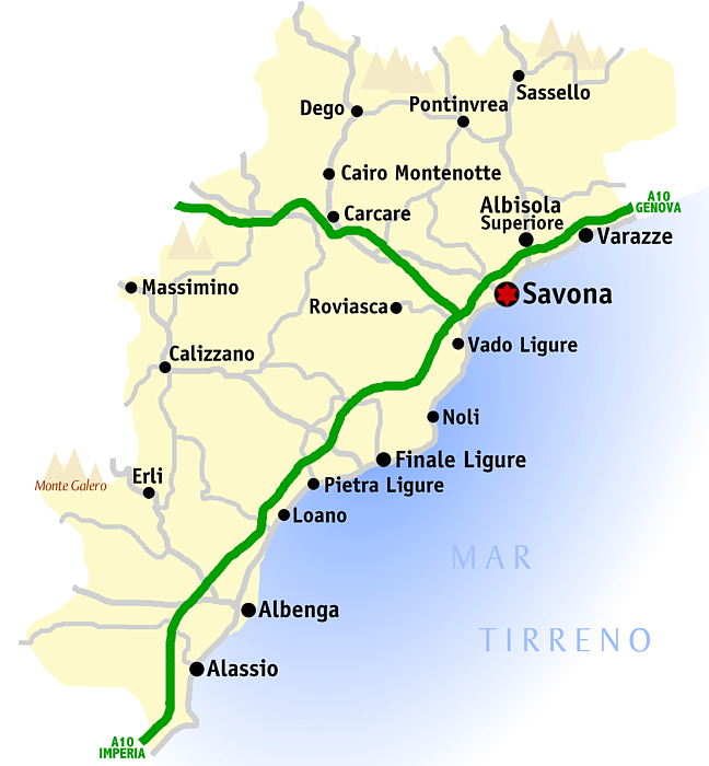 Kaart van de provincie Savona